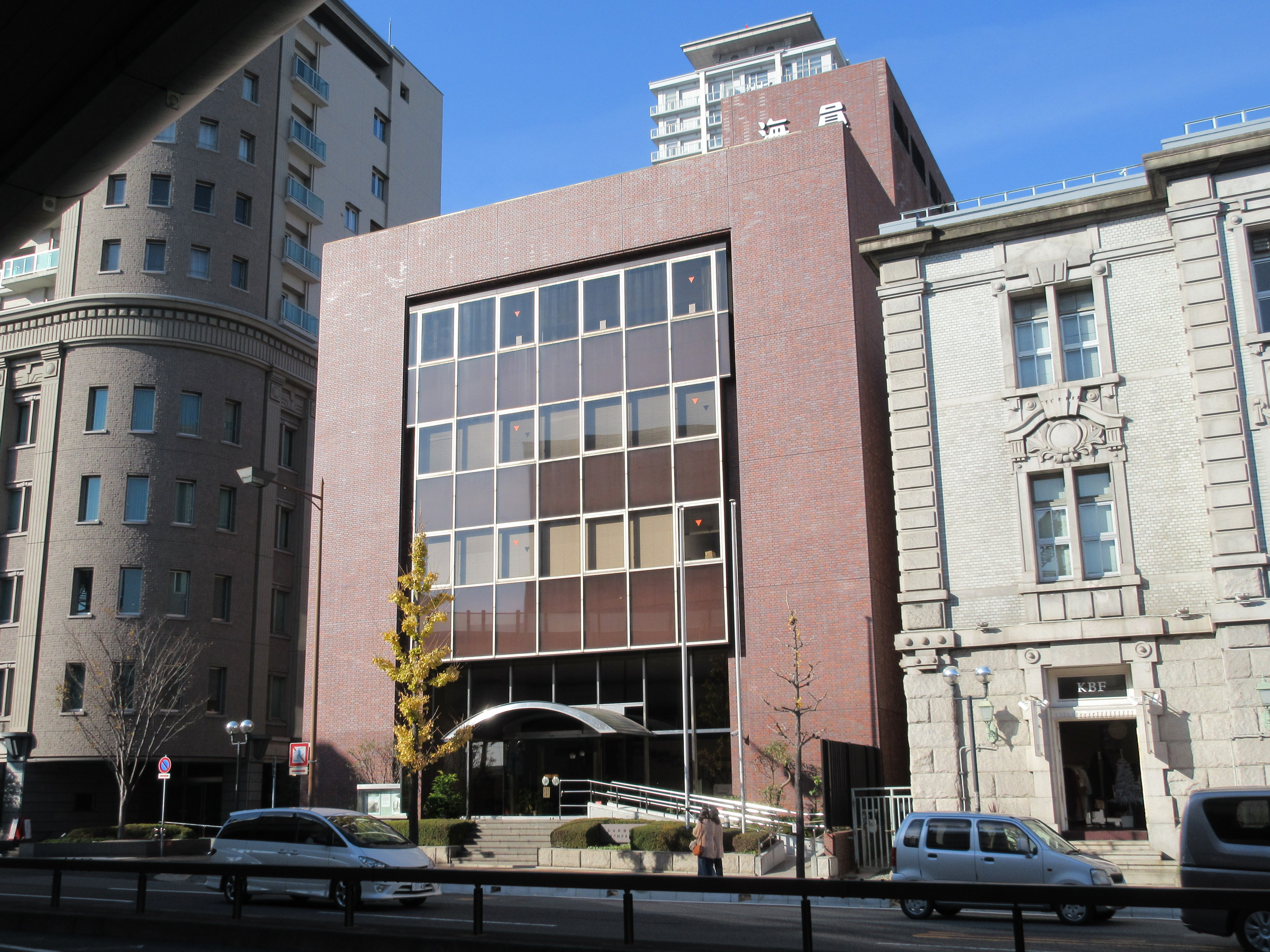 神戸海員ビル